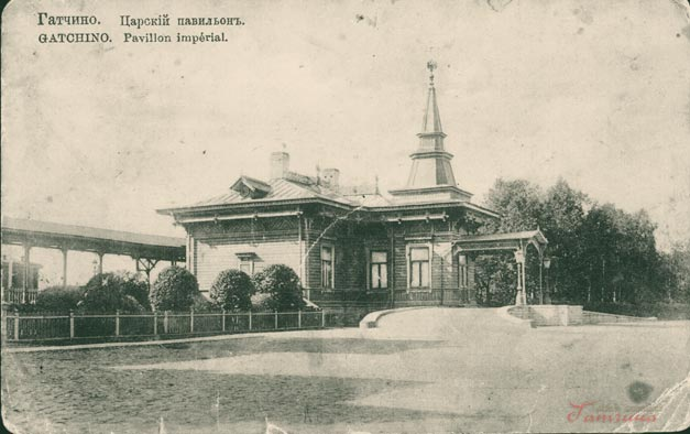 Царский павильон около Балтийского вокзала в Гатчине